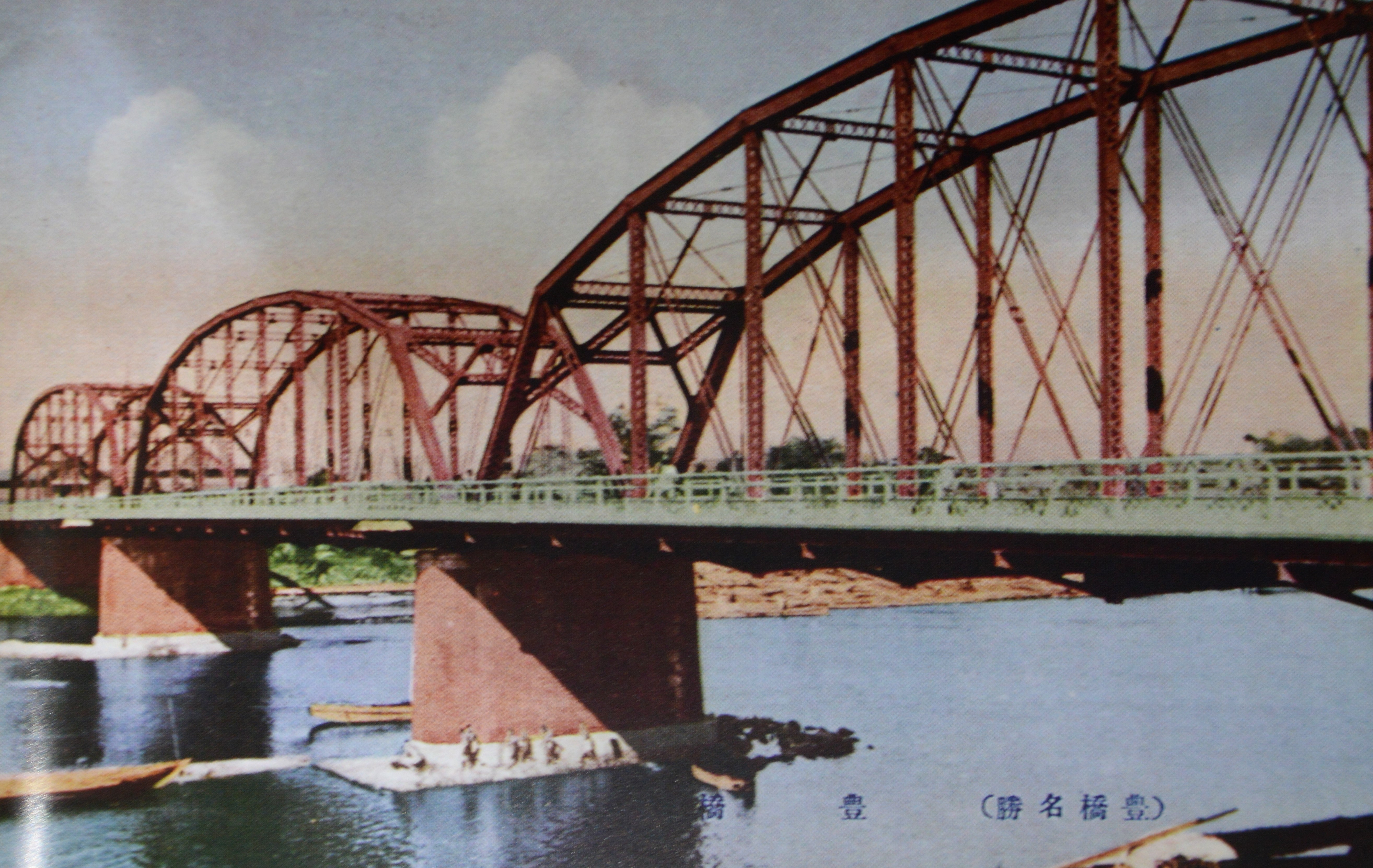 愛知県豊橋市の豊川に架かる豊橋。昭和初期の三連アーチ式鉄橋時代（1916年-1984年）。